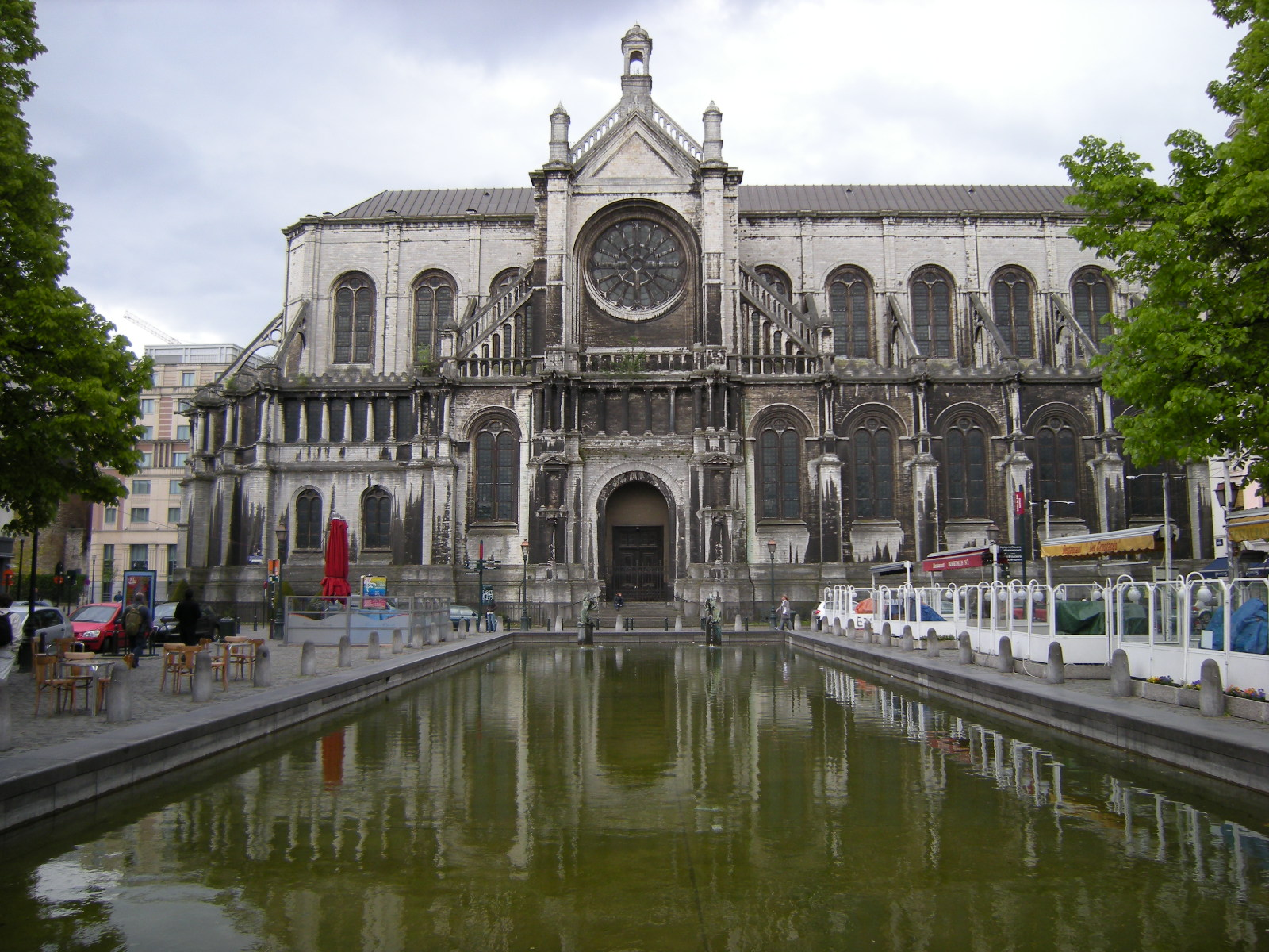 Bruxelas, Bélgica